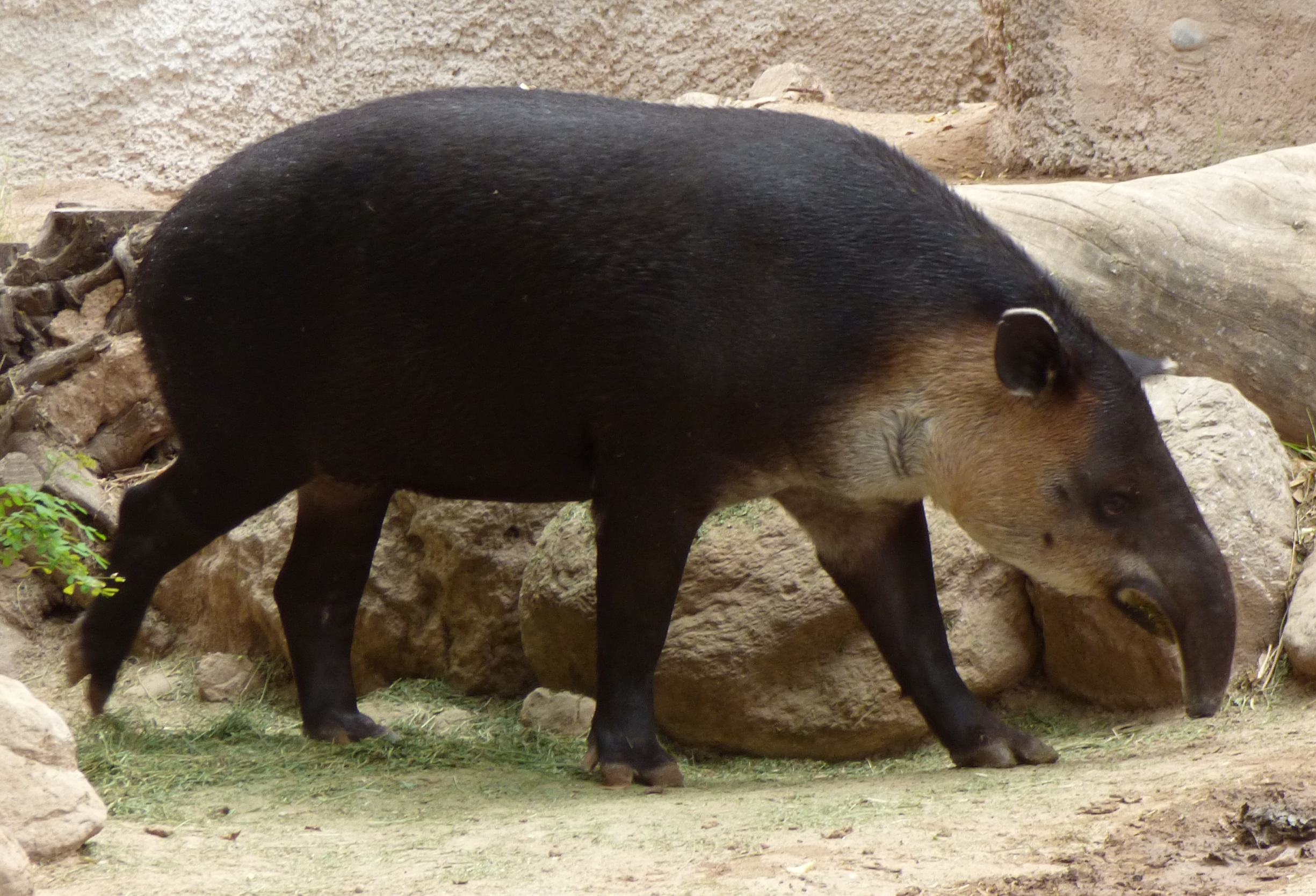 tapir, Tucson Zoo, Arizona / 2014